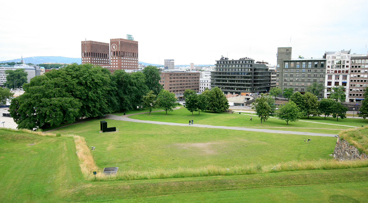 Kontraskjæret ved Akershus festning, Oslo. Tidligere contreescarpe mellom festningen og byen.